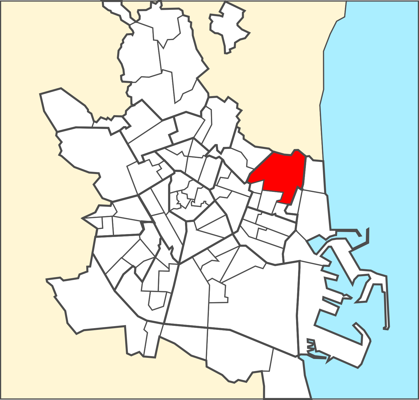 Localització del barri dins de la ciutat de València.